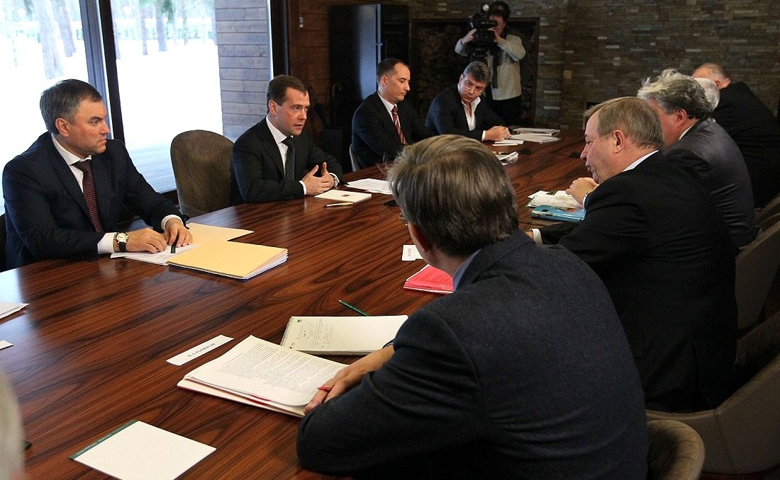 Встреча Медведева с руководителями незарегистрированных партий